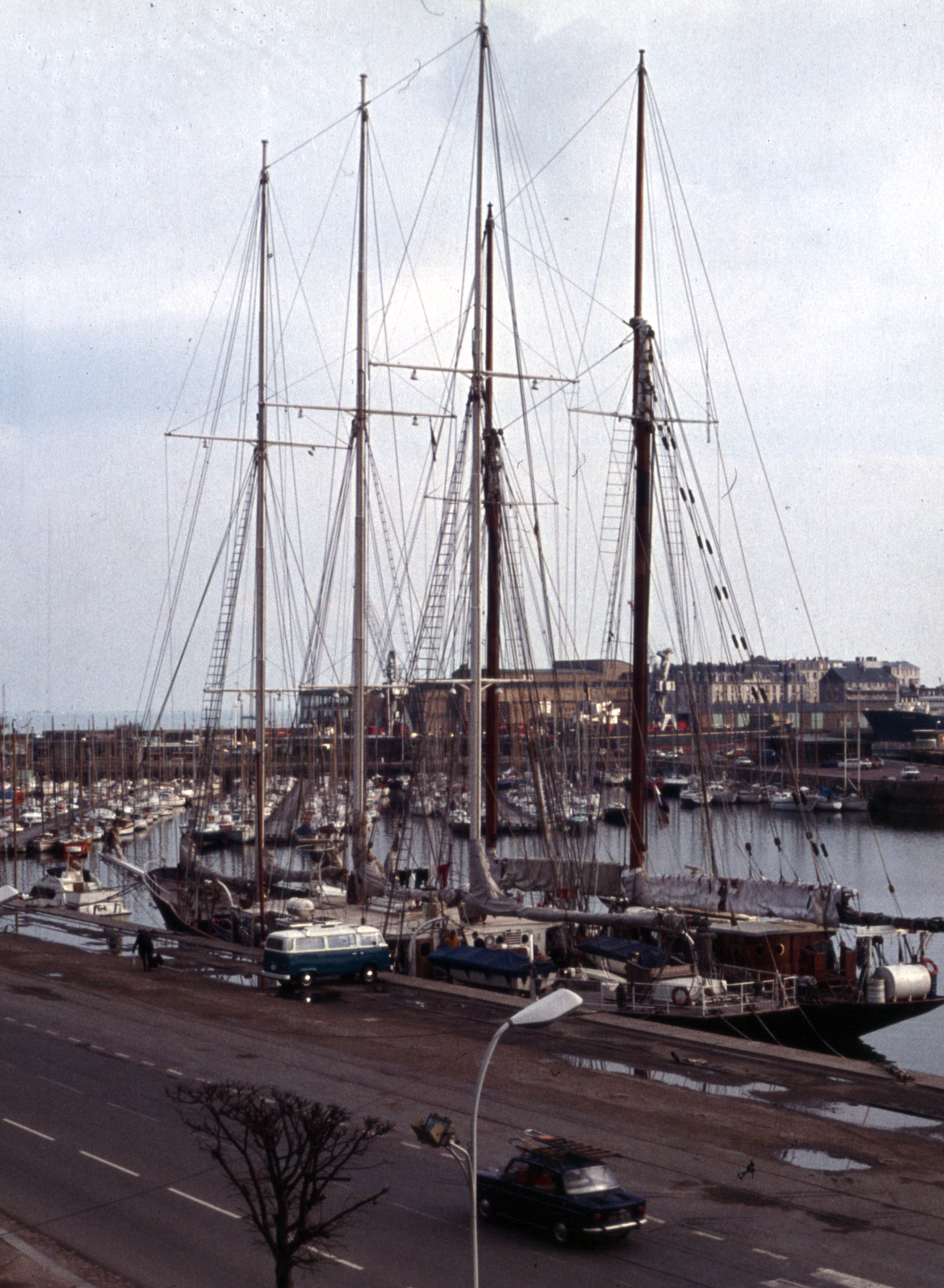 Saint-Malo 1978